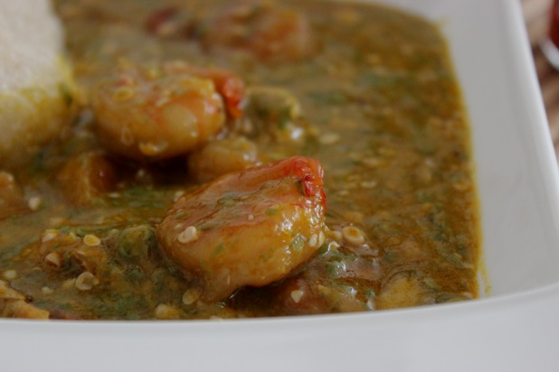 Sauce gombo recette du togo This is an image of food from Cameroon